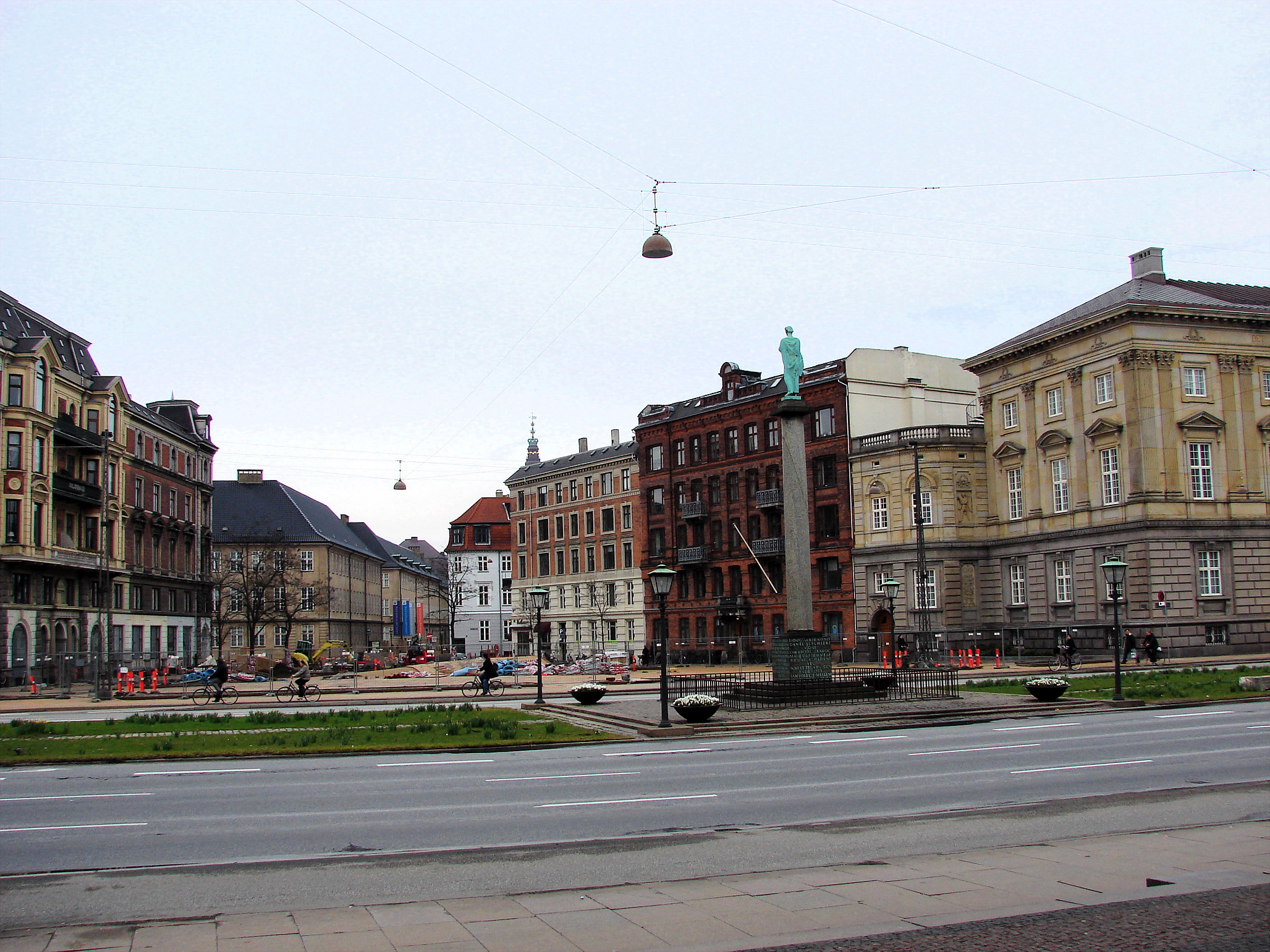 Dantes Plads set fra Glyptoteket, København